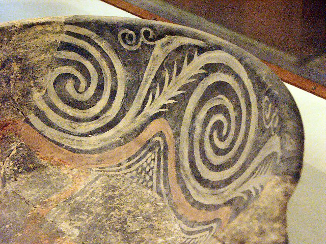 Ornament im Kamares-Stil an einem Gefäß. Archäologisches Museum, Iráklion, Kreta.